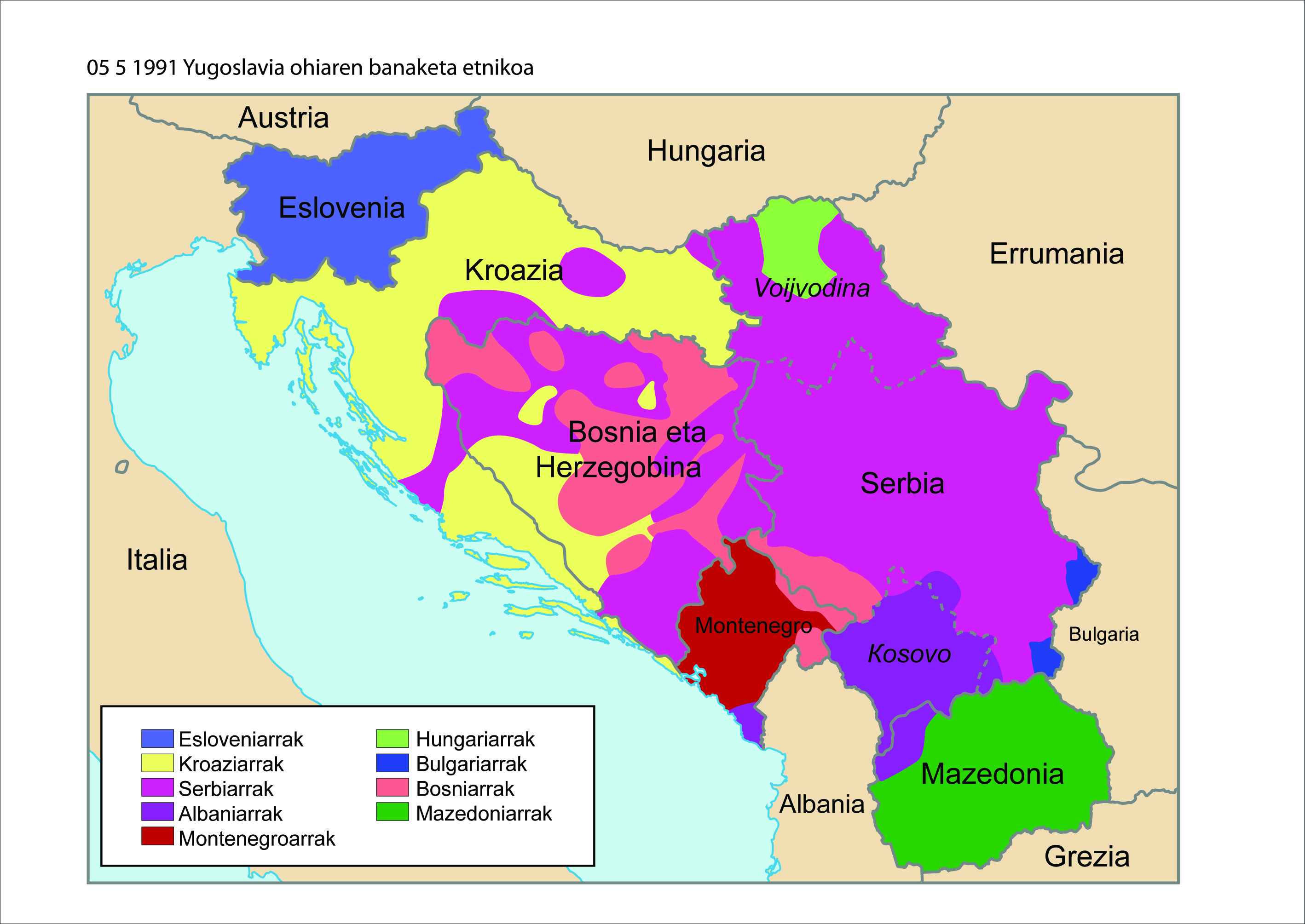 1991 Jugoslavia ohiaren banaketa etnikoa, UEUren liburutik hartua.